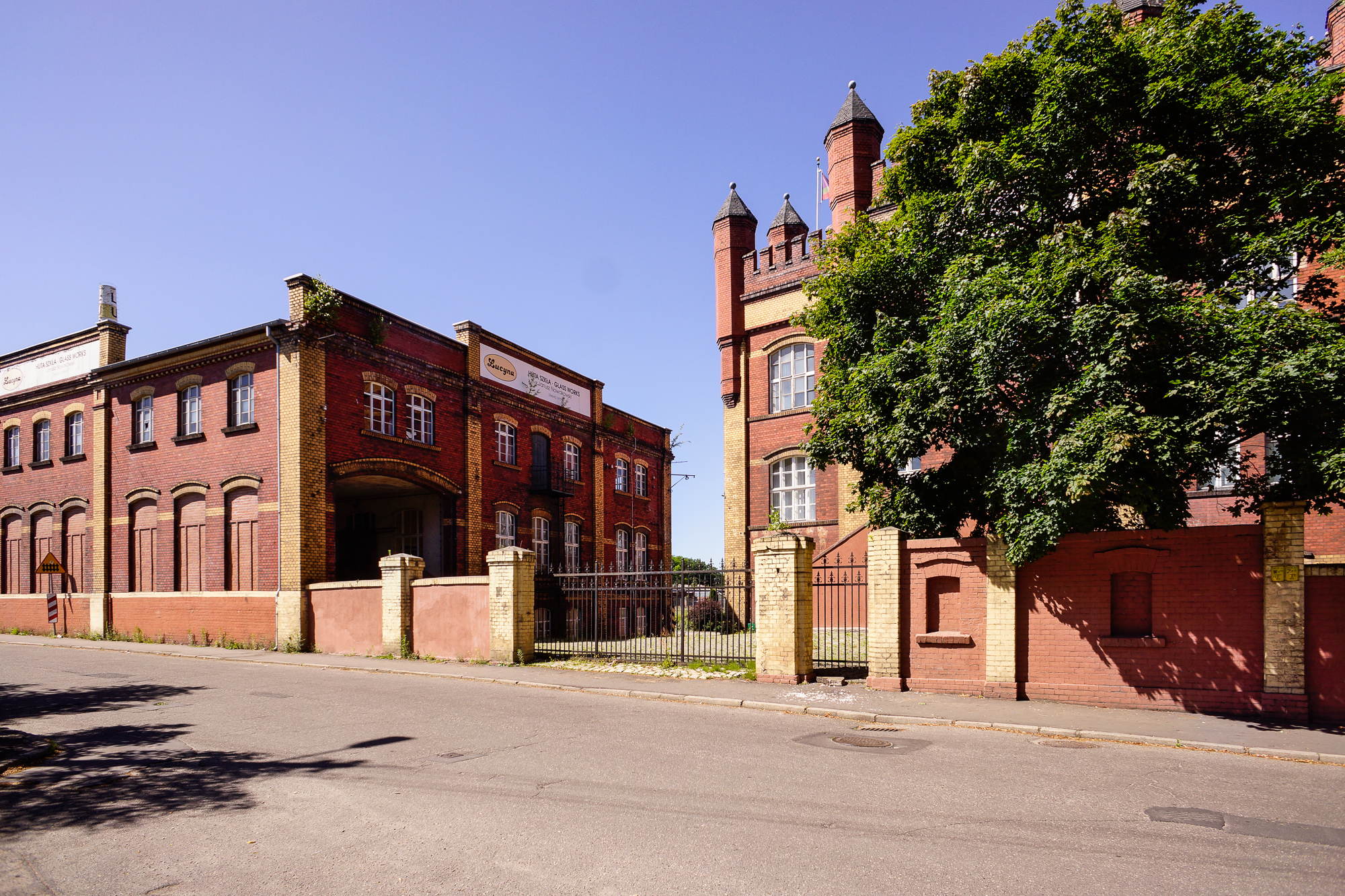 Pieńsk, ul. Dąbrowskiego 44 - zespół Huty Szkła Lucyna (zakład Nysa)